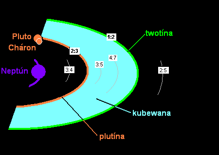 Zjednodušená schéma Kuiperovho pásu